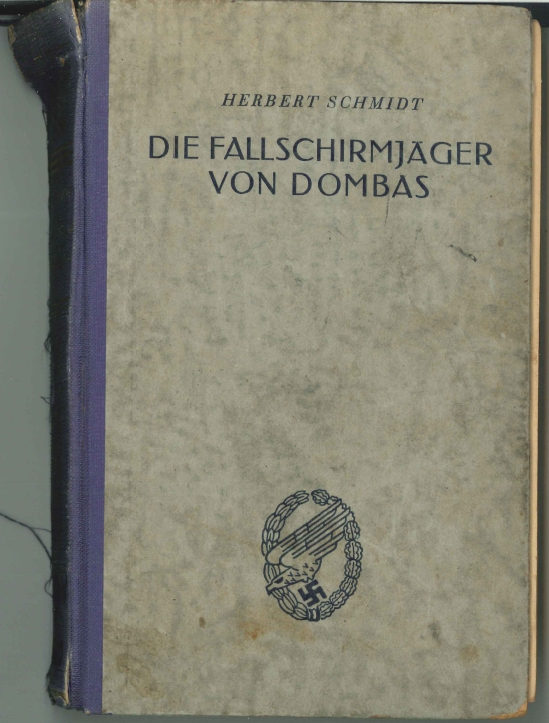 Das Buch des Fallschirmjägers Herbert Schmidt: "Die Fallschirmjäger von Dombas" Berlin 1941